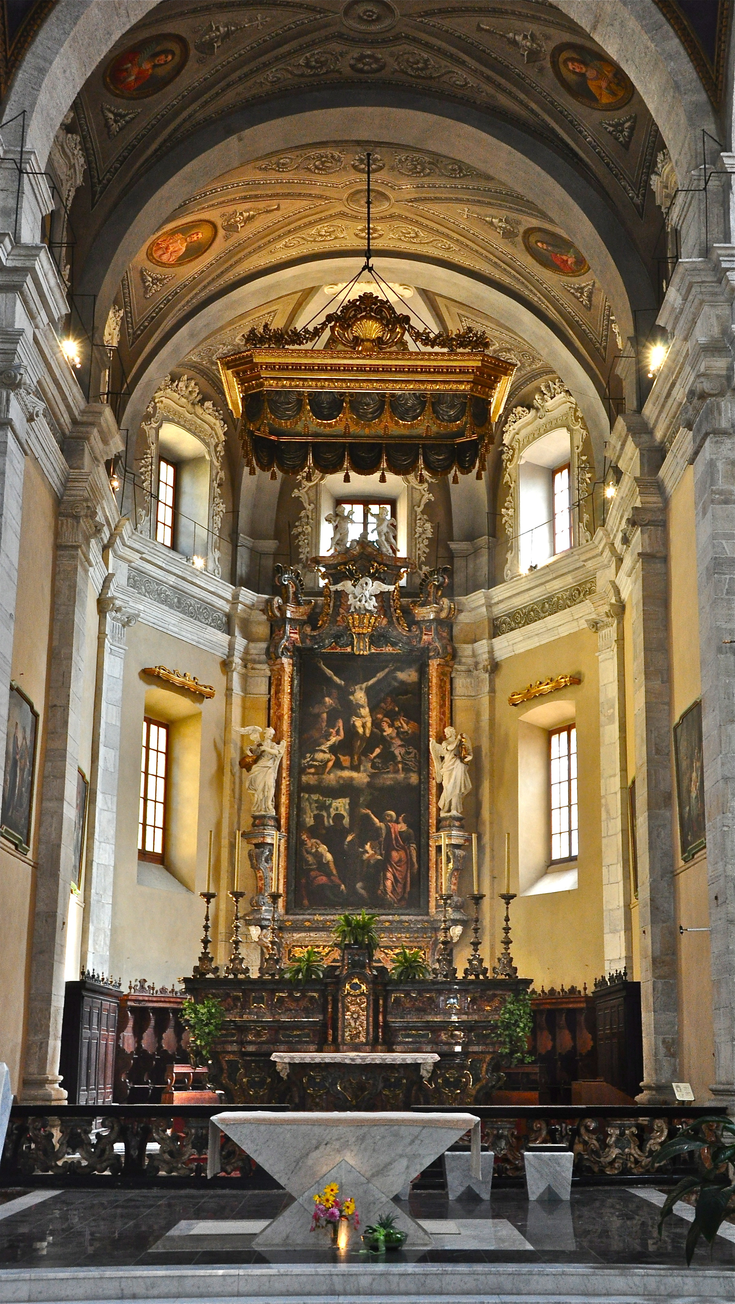 L'altare principale.